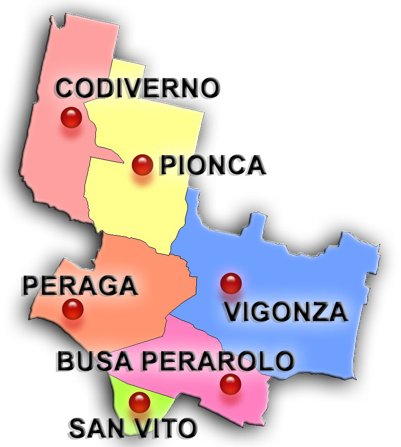 Immagine in formato jpeg ricavata da cartografia GIS riguardante la suddivisione in frazioni urbanistiche del territorio del Comune di Vigonza